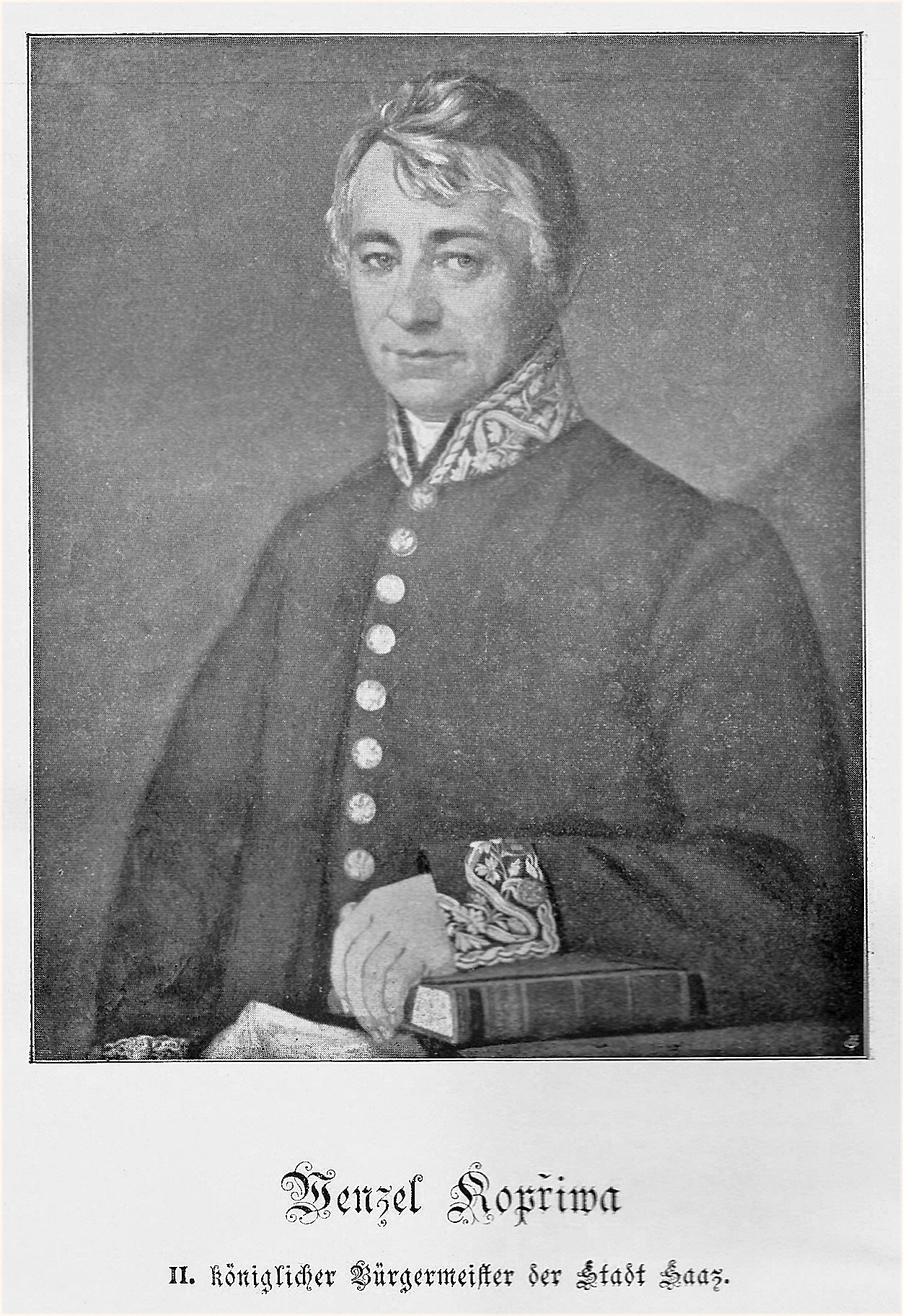 Wenzel Kopřiwa (1781–1838), von 1816 bis 1828 zweiter königlicher Bürgermeister der Stadt Saaz